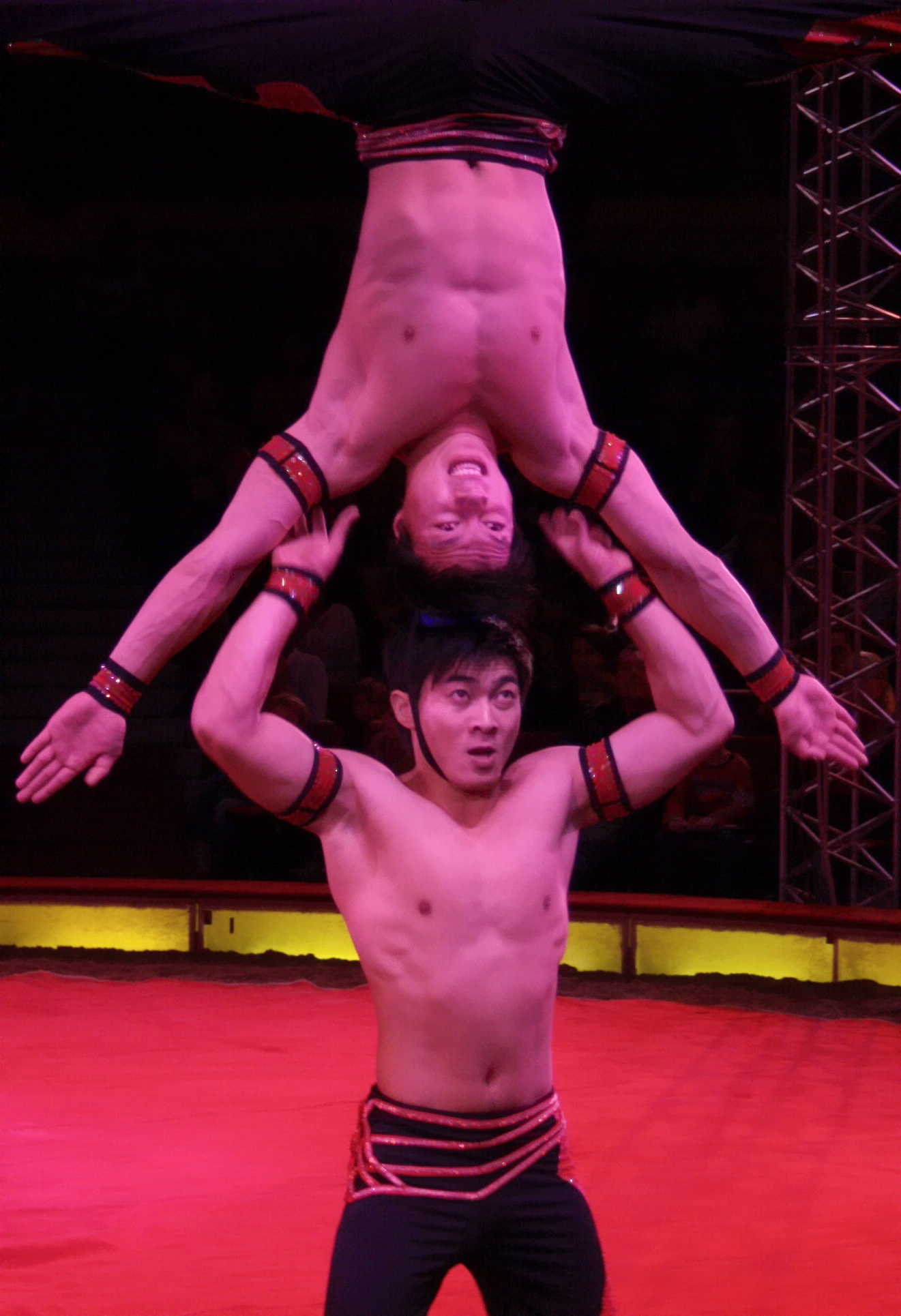 Die Giang Brothers. Zirkusartisten aus Vietnam. Quoc Co Giang 27 und Quoc Nghiep 22. Ausgebildet an der Circusschule von Ho Chi Minh City.